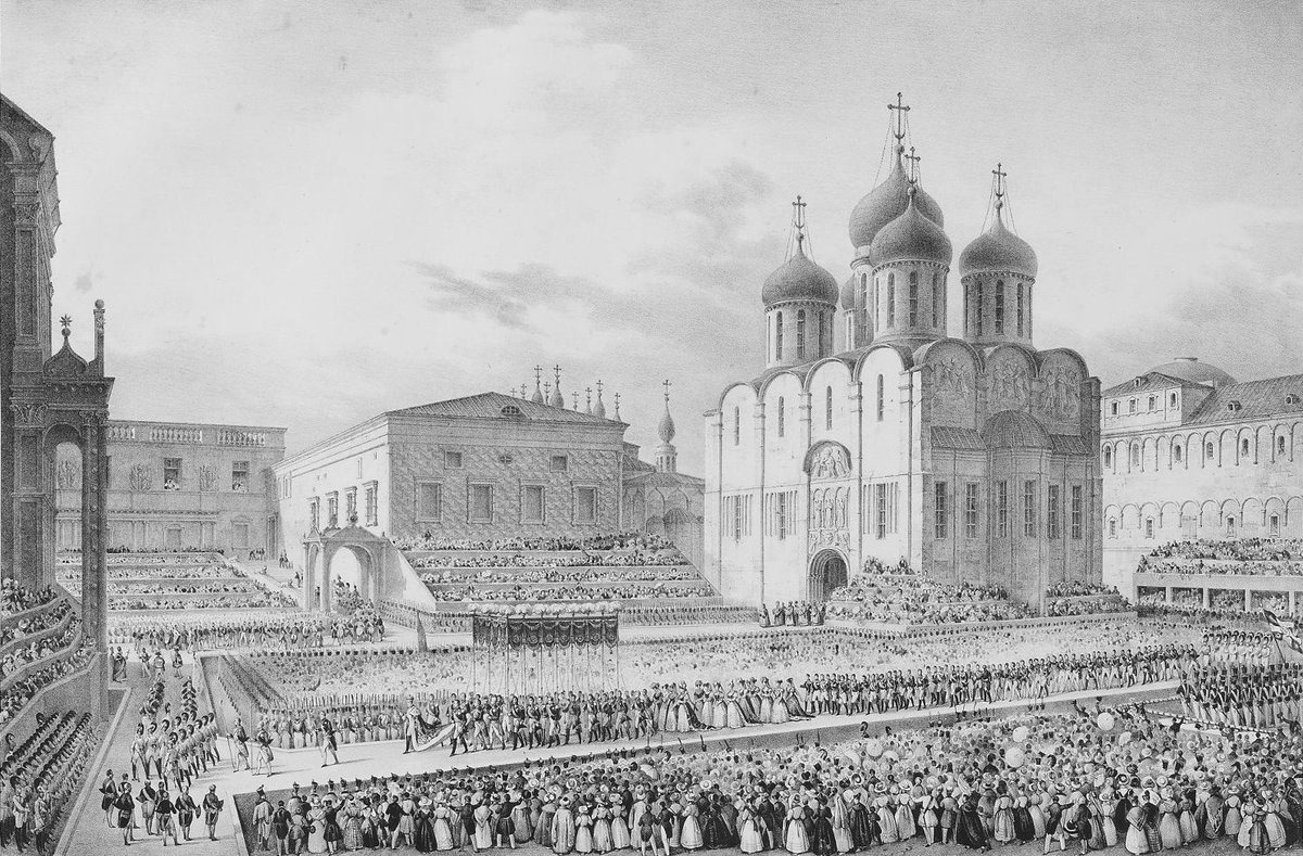 Празднования на площади в день Коронации. Подпись: Retour de leurs majestes au palais des anciens tsars.